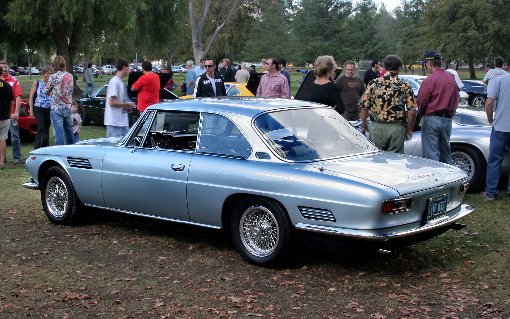 1966 Iso Rivolta GT - lt blue - rvl2